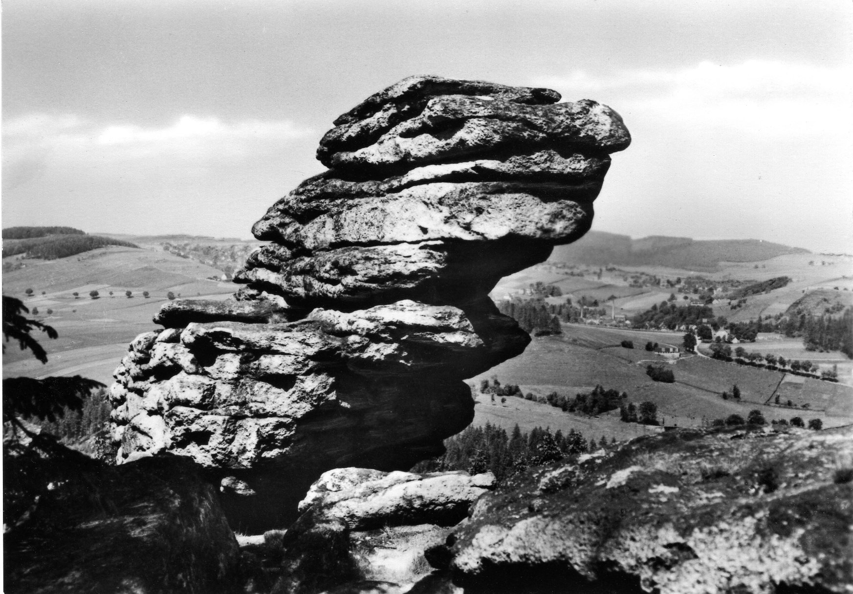 Der "Frosch" ist eine Felsformation nahe Schönheide und wird auch "Walfischkopf" genannt.